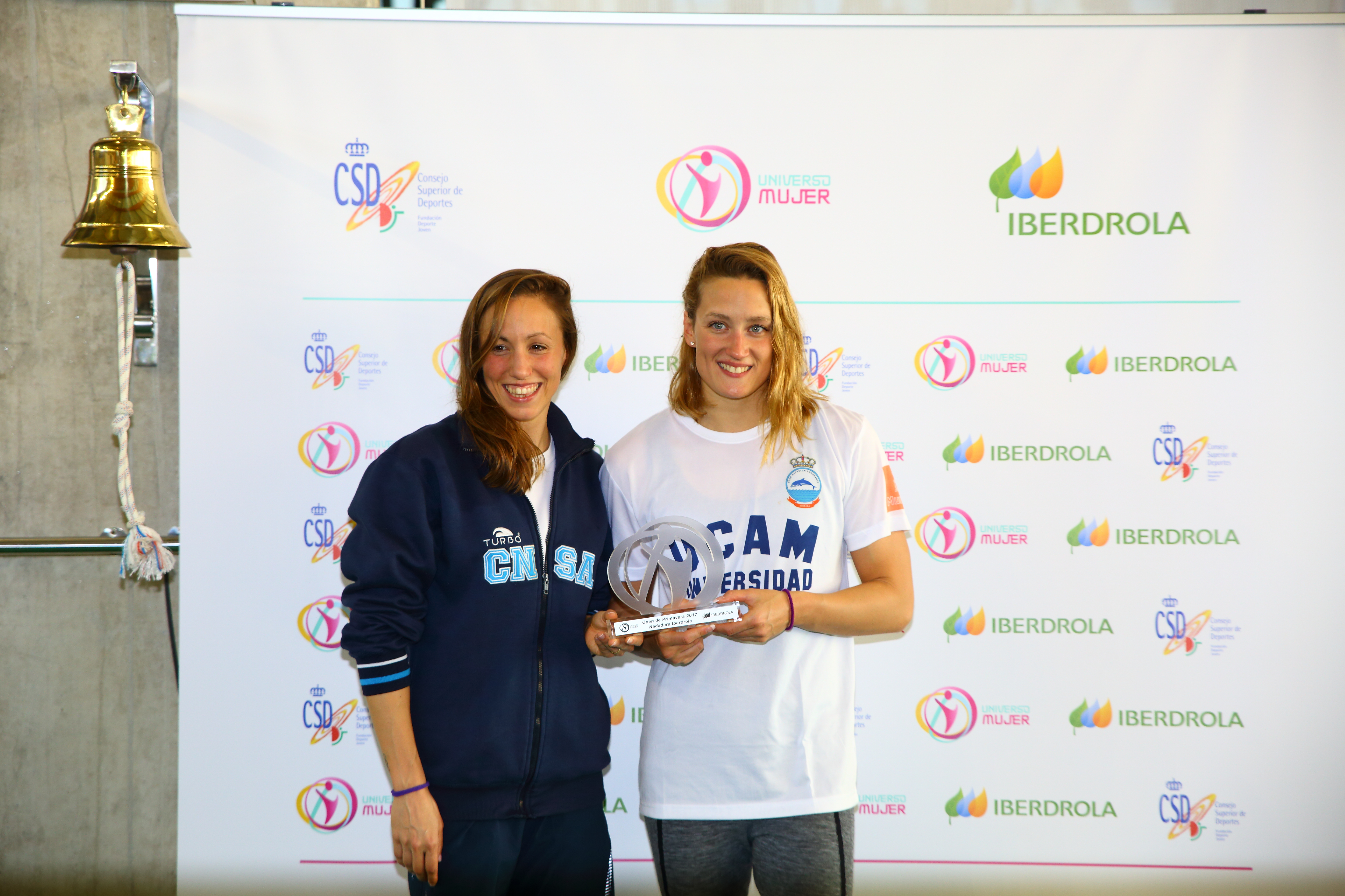 Campeonato de España Absoluto Open de Primavera de 2017 Pontevedra Última jornada, Martes 11 Mireia—Jessica, empate FINA en el MVP Iberdrola